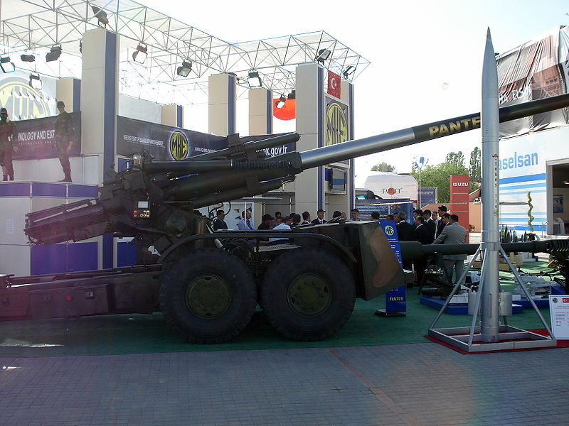 IDEF '07 Savunma Fuarı'nda çekildi. Panter. 23 Mayıs 2007